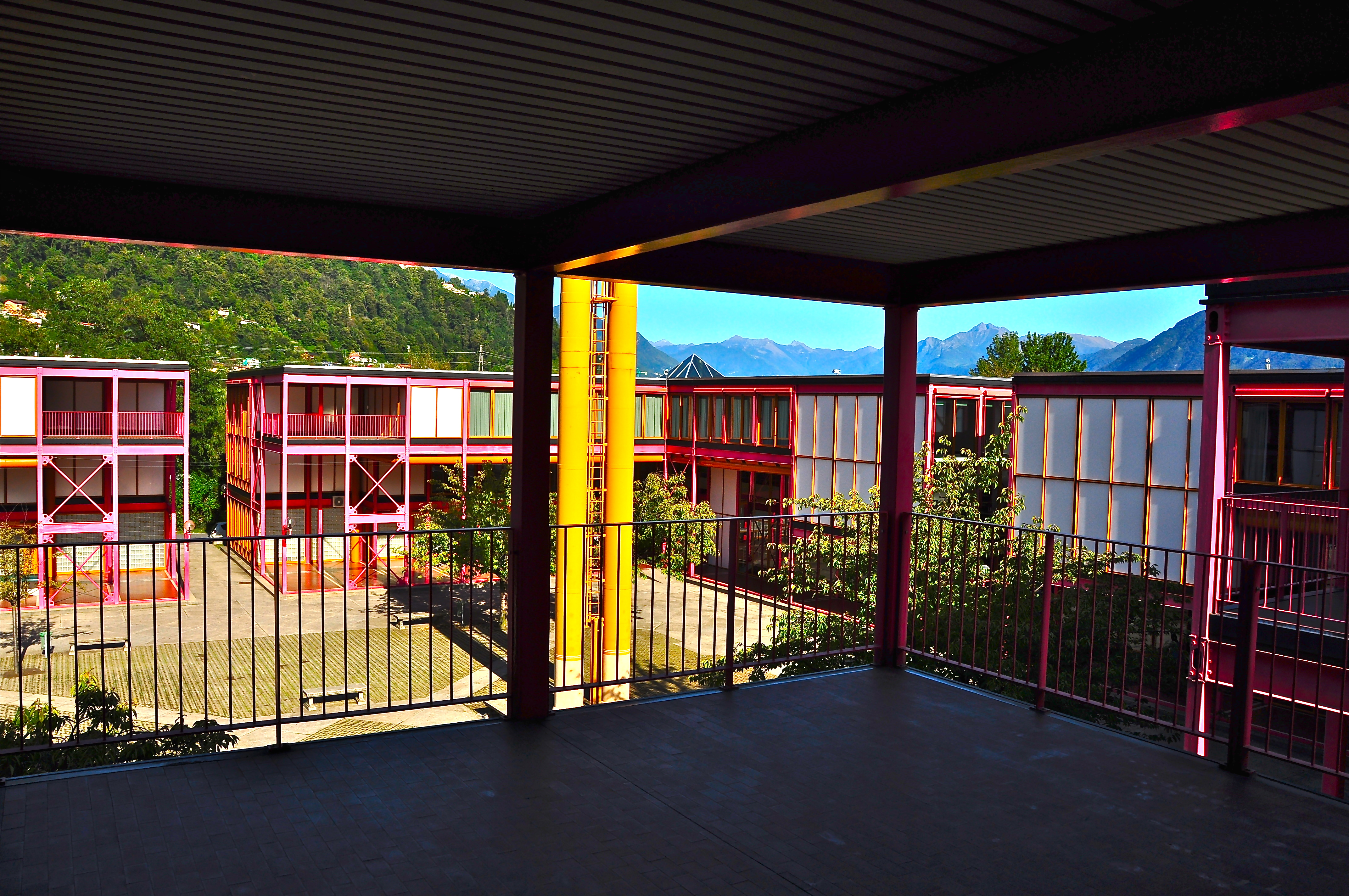 Veduta dalla terrazza (2° piano blocco C)